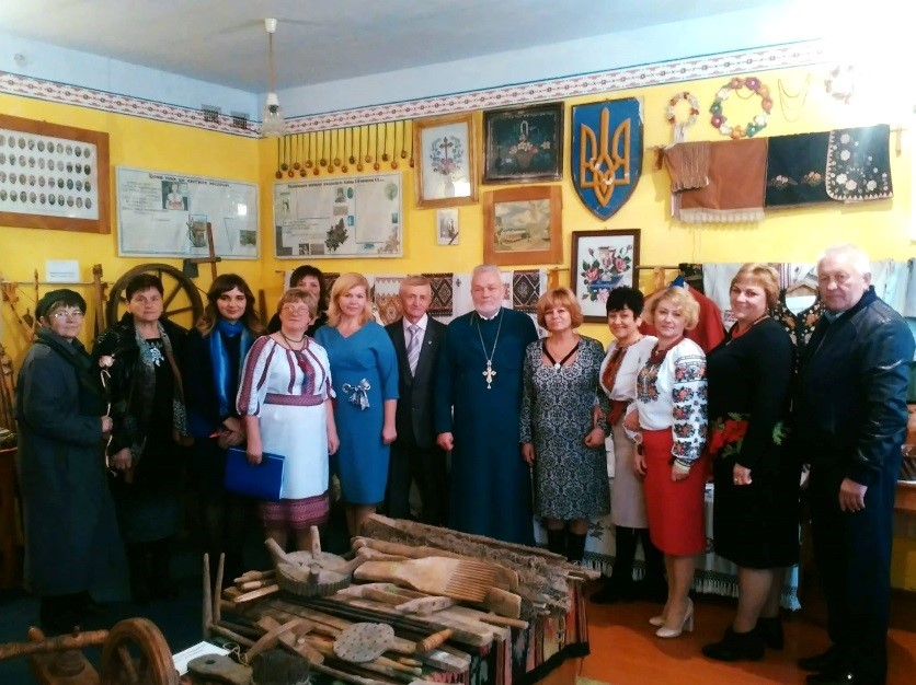 Екскурсія в музеї «Світлиця» для гостей святкування 50-річчя Новосільського НВК